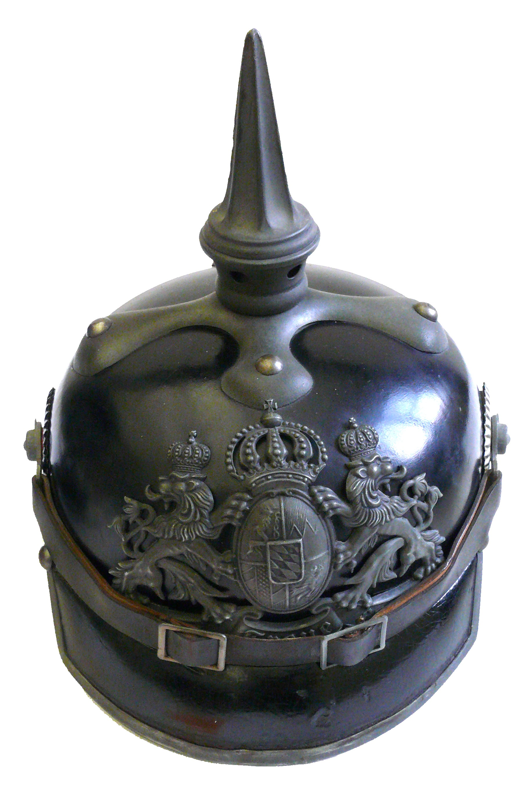 3 Helme um 1915 1. Ulanen-Czapka (Mannschaft) 2. Infanterie (Mannschaft) 3. Feldartillerie (Mannschaft)